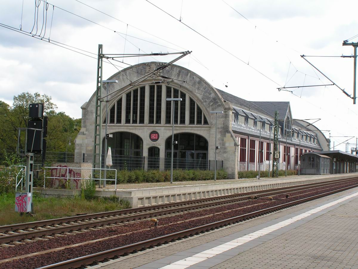 Potsdam, Kaiserbahnhof, Bahnhofshalle